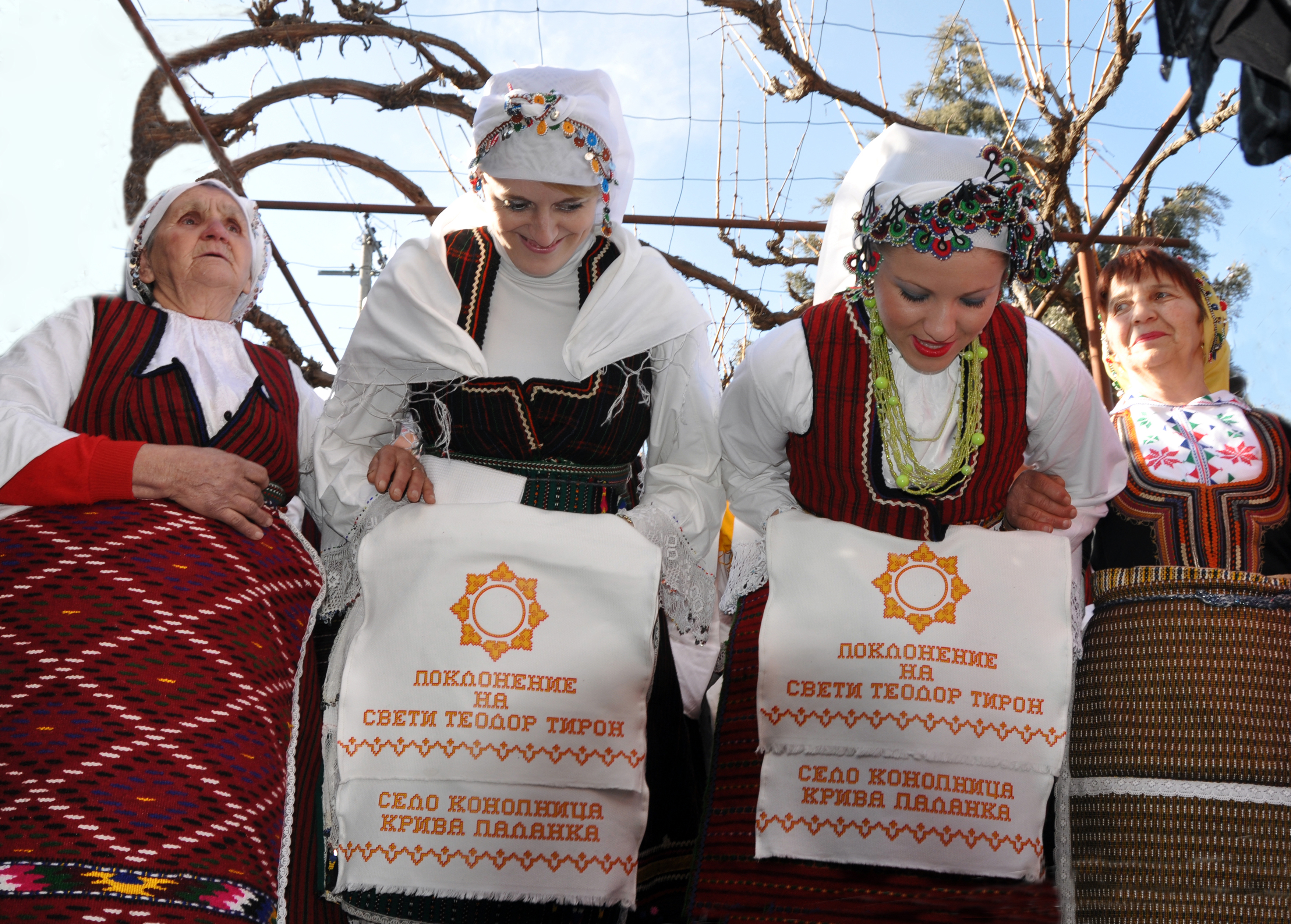 Невестинско поклонение на Свети Теодор -Тирон село конопница, Крива Паланка